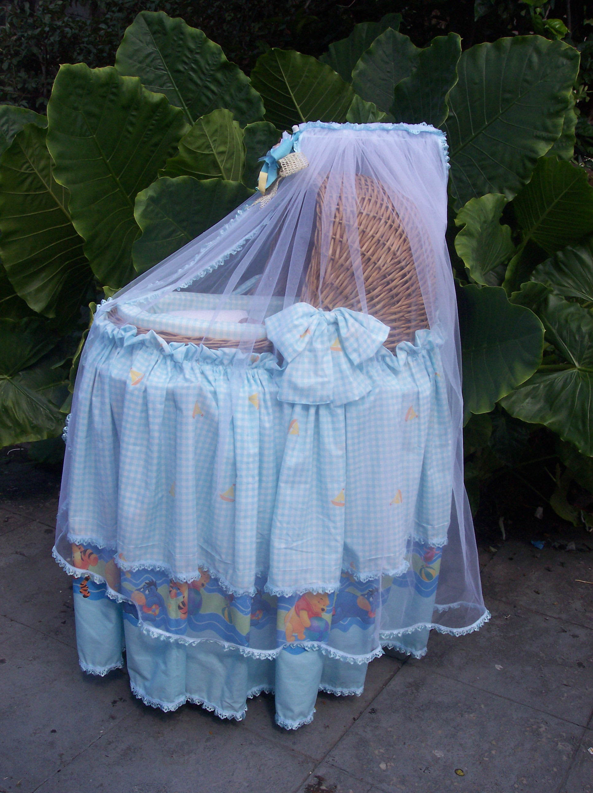 Traditional bed for babies in some countries like Mexico. SPANISH: Moiśes. El ropaje del moisés fue hecho por Susana Torres Sánchez. Ciudad de Veracruz, Veracruz, México.